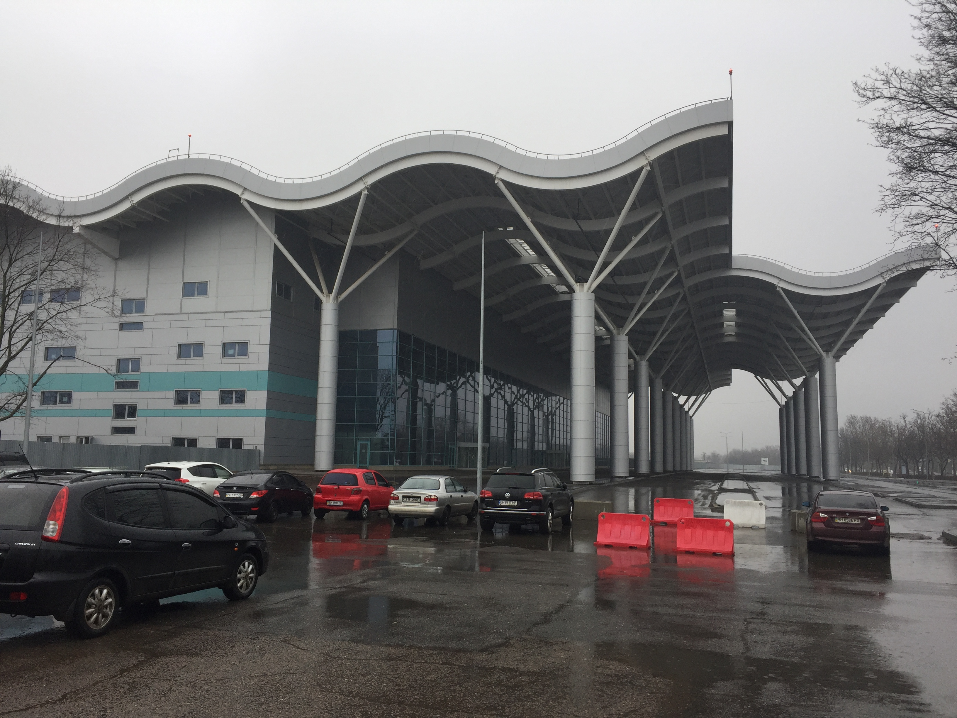 Новый терминал аэропорта Одесса